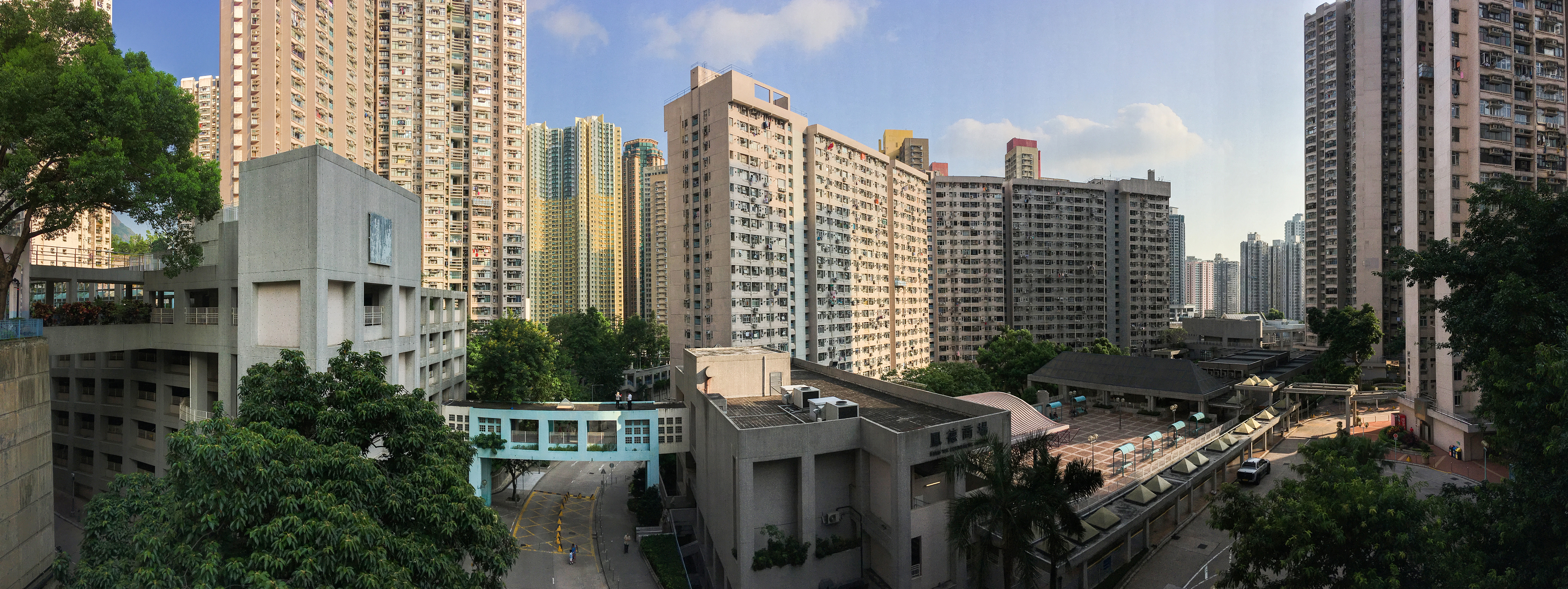 Fung Tak Estate Pano